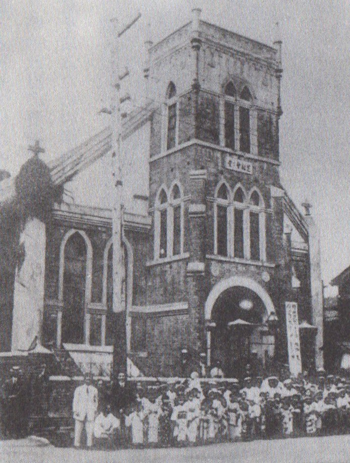 日本基督教団芝教会の1888年頃の会堂